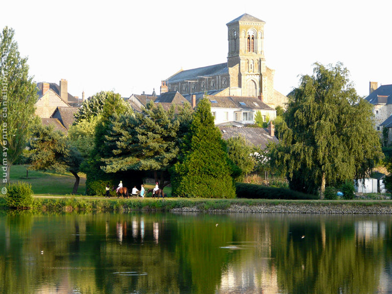 Eglise Saint Martin, Lac de Villiers-Charlemagne